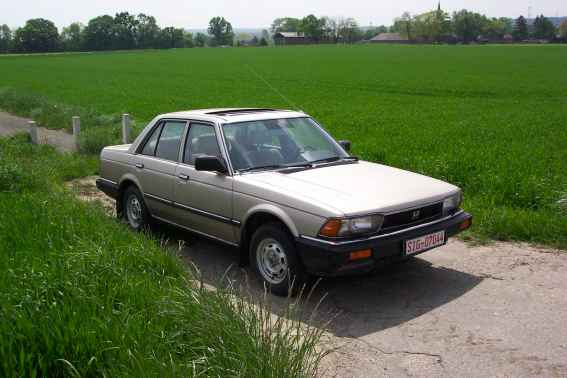 Honda Accord (1981-1985 Typ SY)